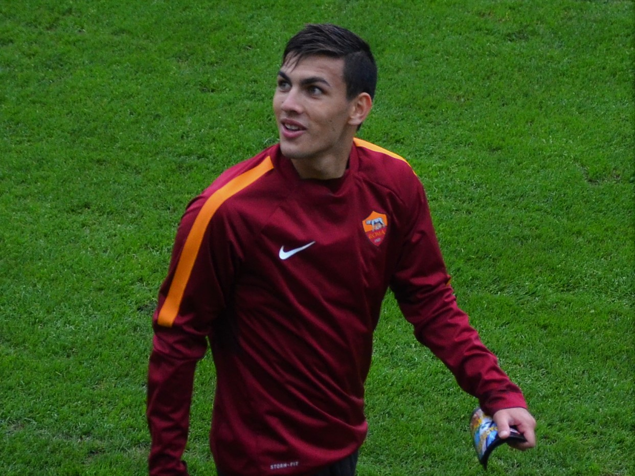 Fonte